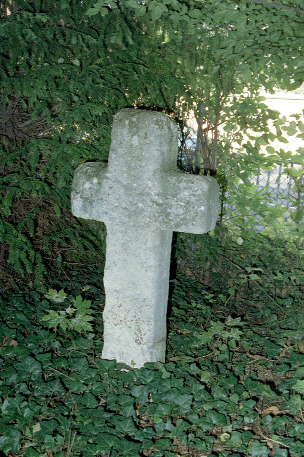 Steinkreuz in Mainz-Weisenau; auf dem Friedhof, dicht am Zaun zum Heiligkreuzweg